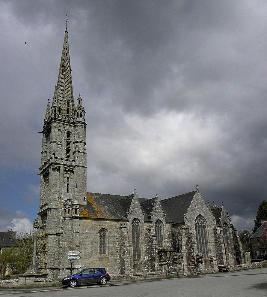 Église Saint-Émilion de Loguivy-Plougras (22). Vue méridionale.